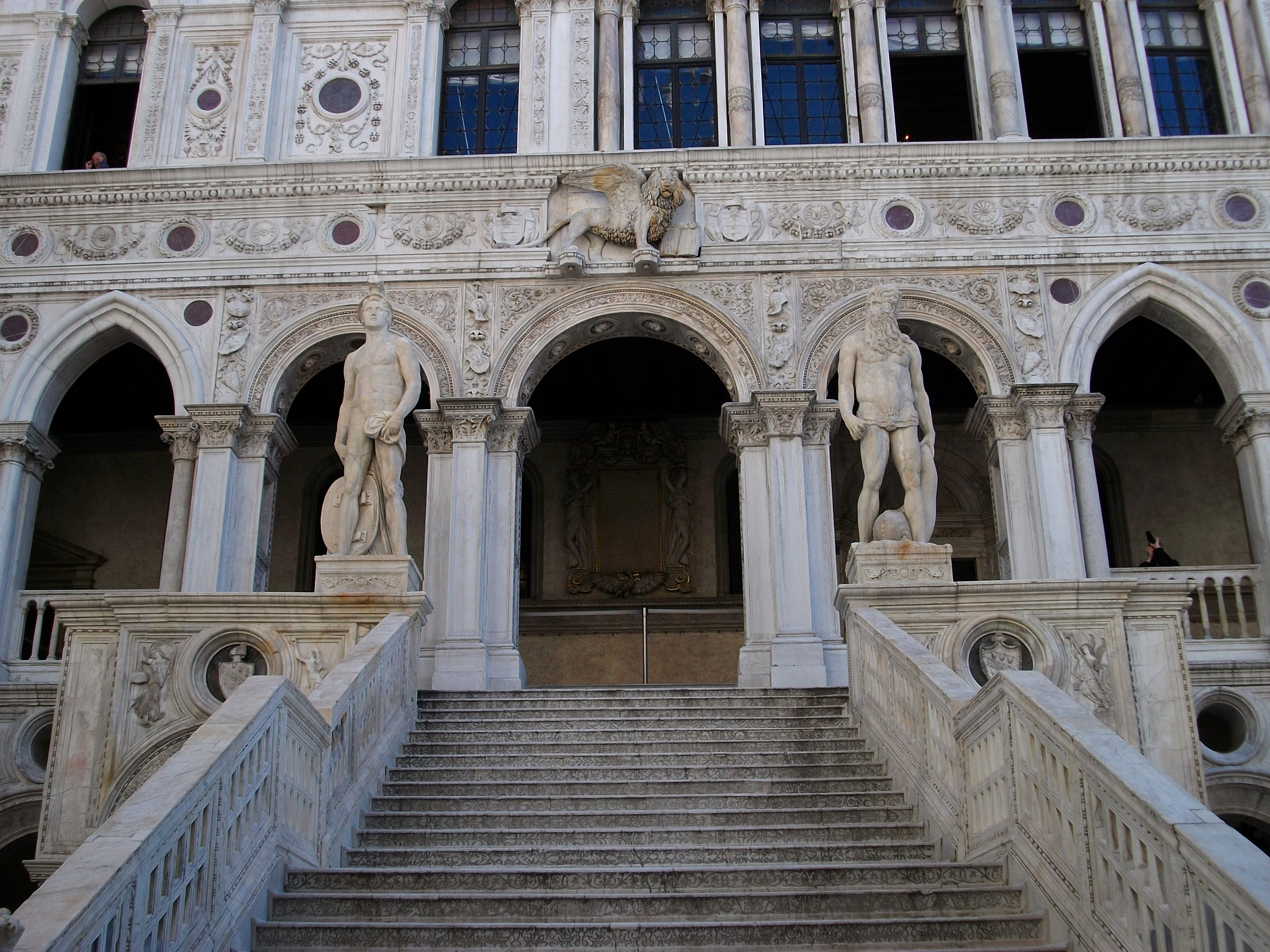 Escala dels Gegants, pati del Palau Ducal de Venècia.